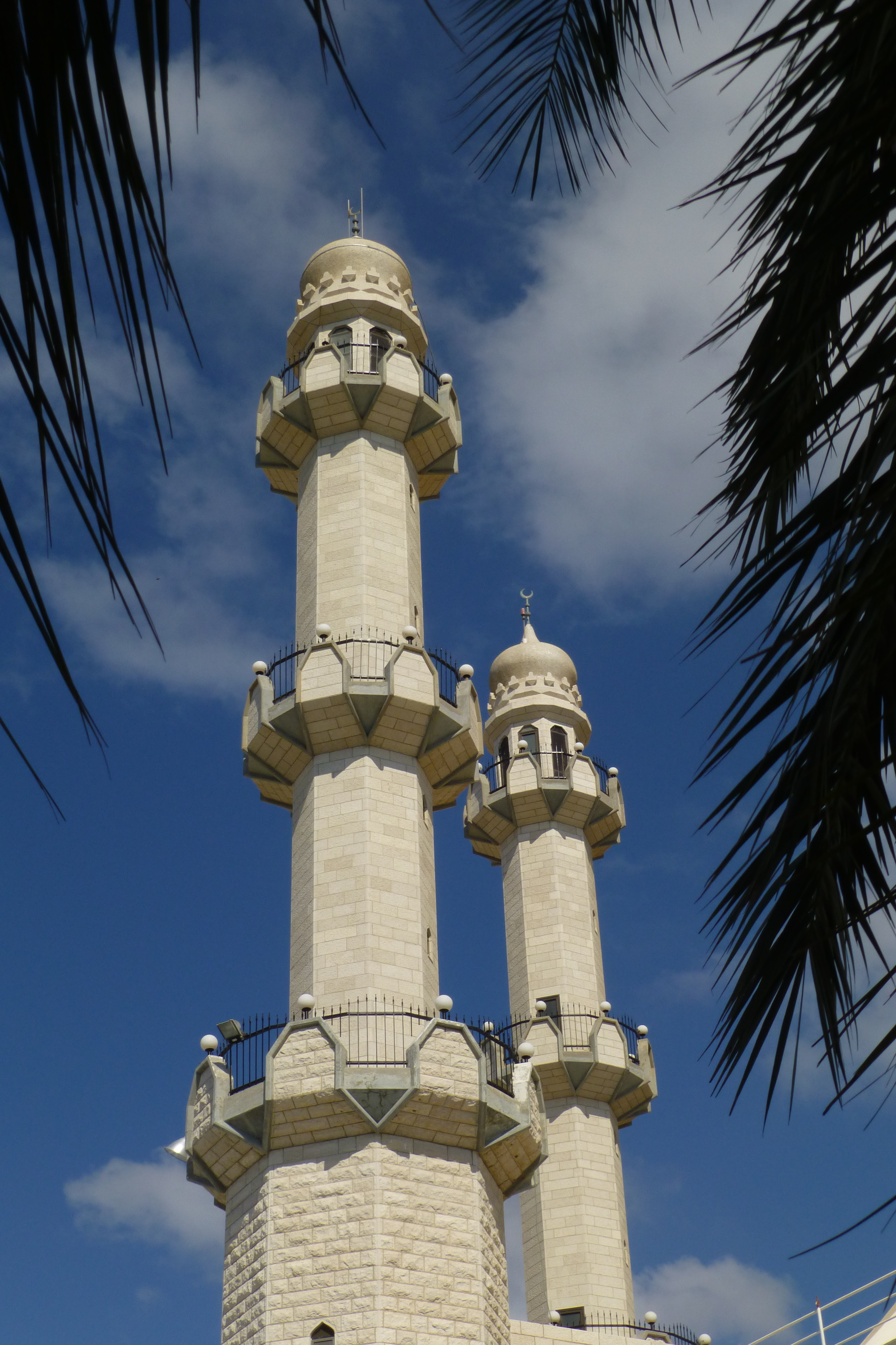 מסגד סיידנא מחמוד בשכונת כבביר בחיפה. מסגד זה משתייך לפלג האחמדים שנוסד בהודו ומטיף לנאורות, שלום ואהבה לאחר.